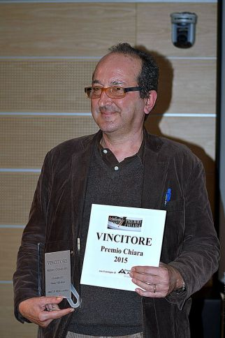 Francesco Recami, scrittore italiano